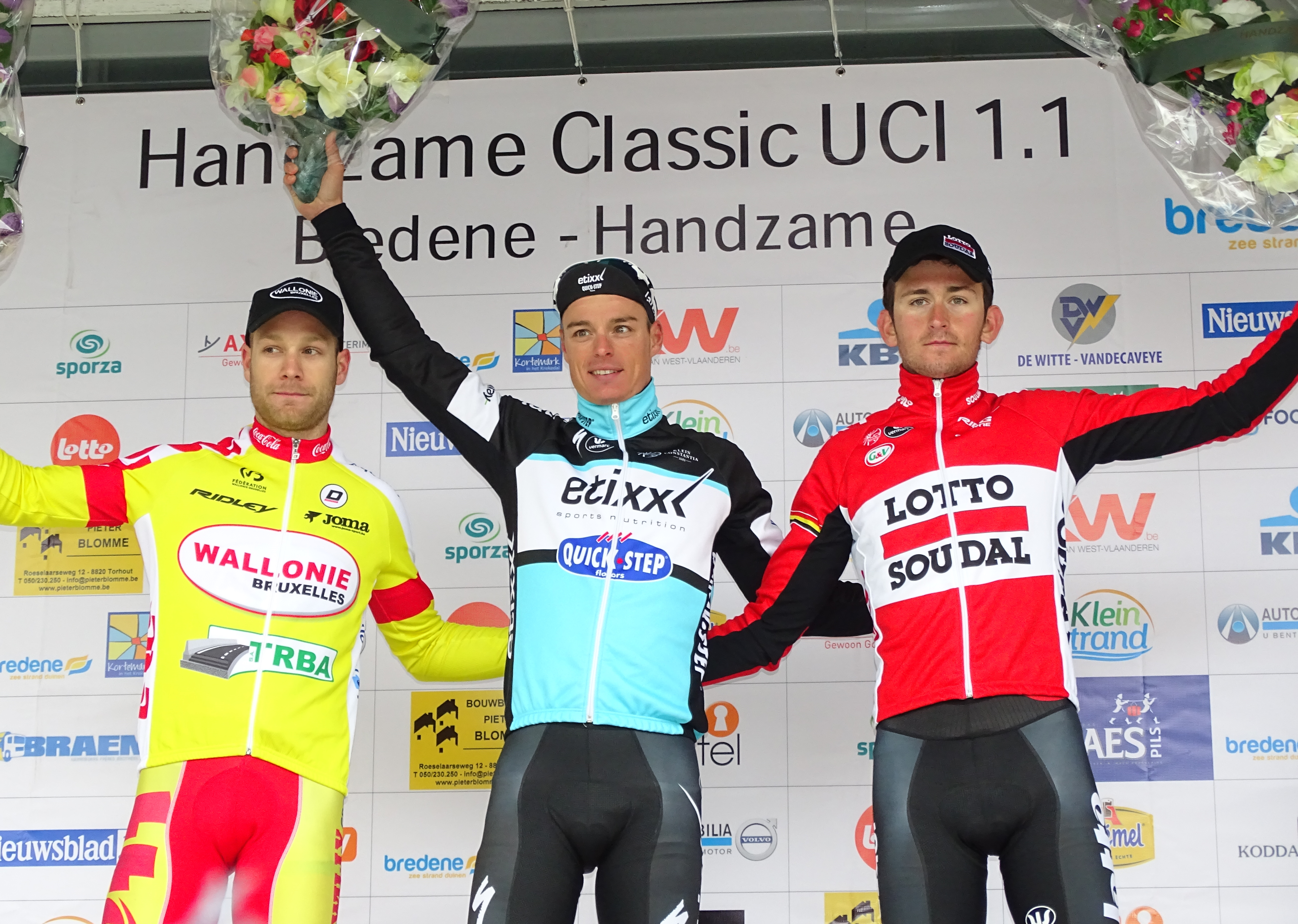 Reportage réalisé le vendredi 20 mars à l'occasion de l'arrivée de la Handzame Classic 2015 à Bredene (Kortemark), Belgique.